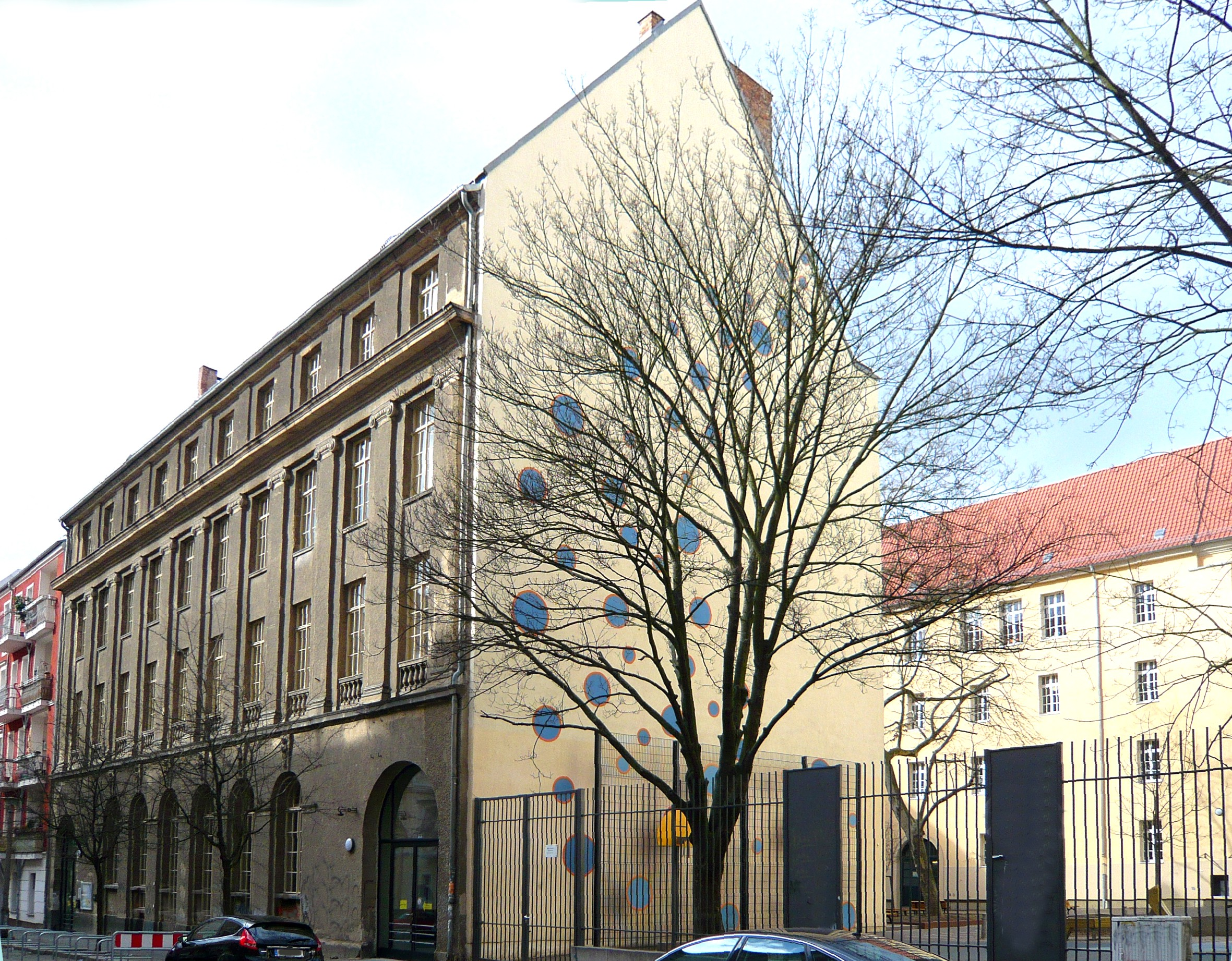 Ortsteil Berlin-Friedrichshain: Zellestraße, Musikschule Friedrichshain